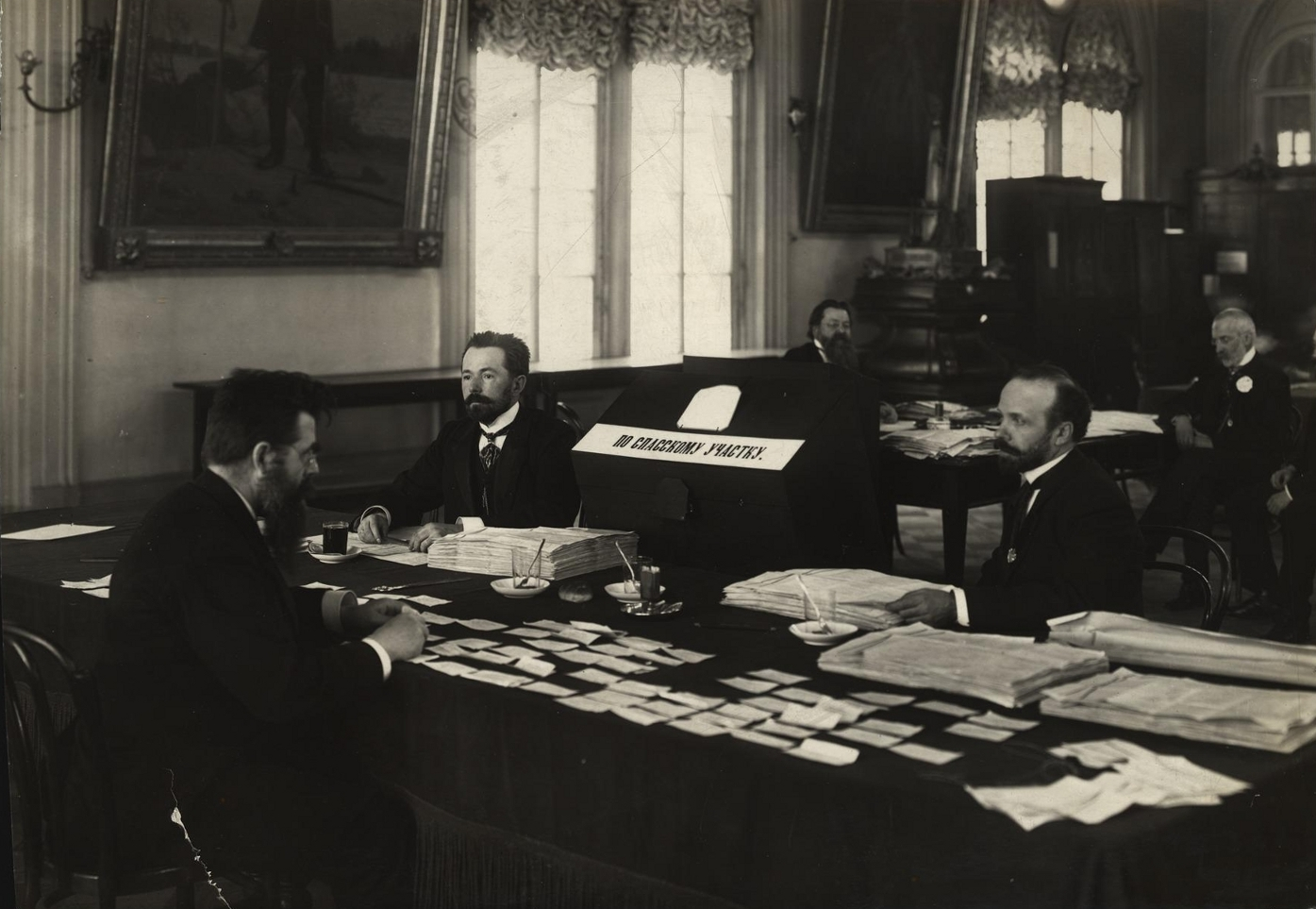 Работа комиссии по подсчету голосов избирателей Государственной Думы.